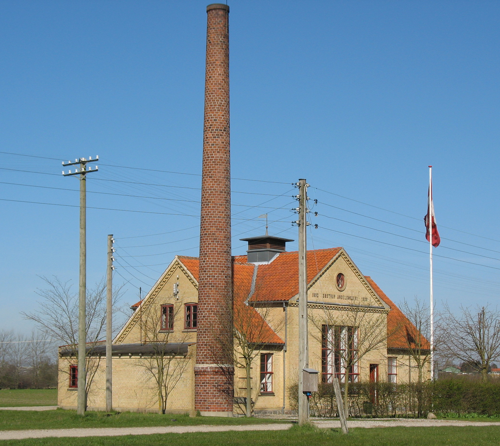 Søstrup Andelsmejeri - fra Andelslandsbyen Nyvang